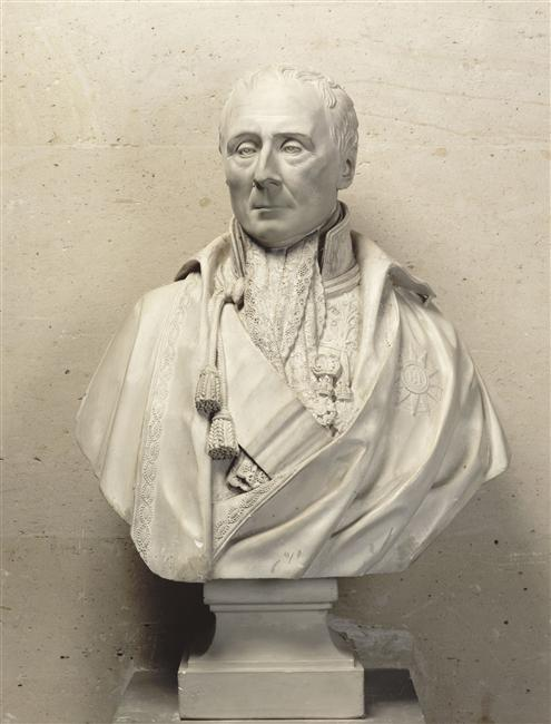 Buste de Joseph-Louis Lagrange (1736-1813)